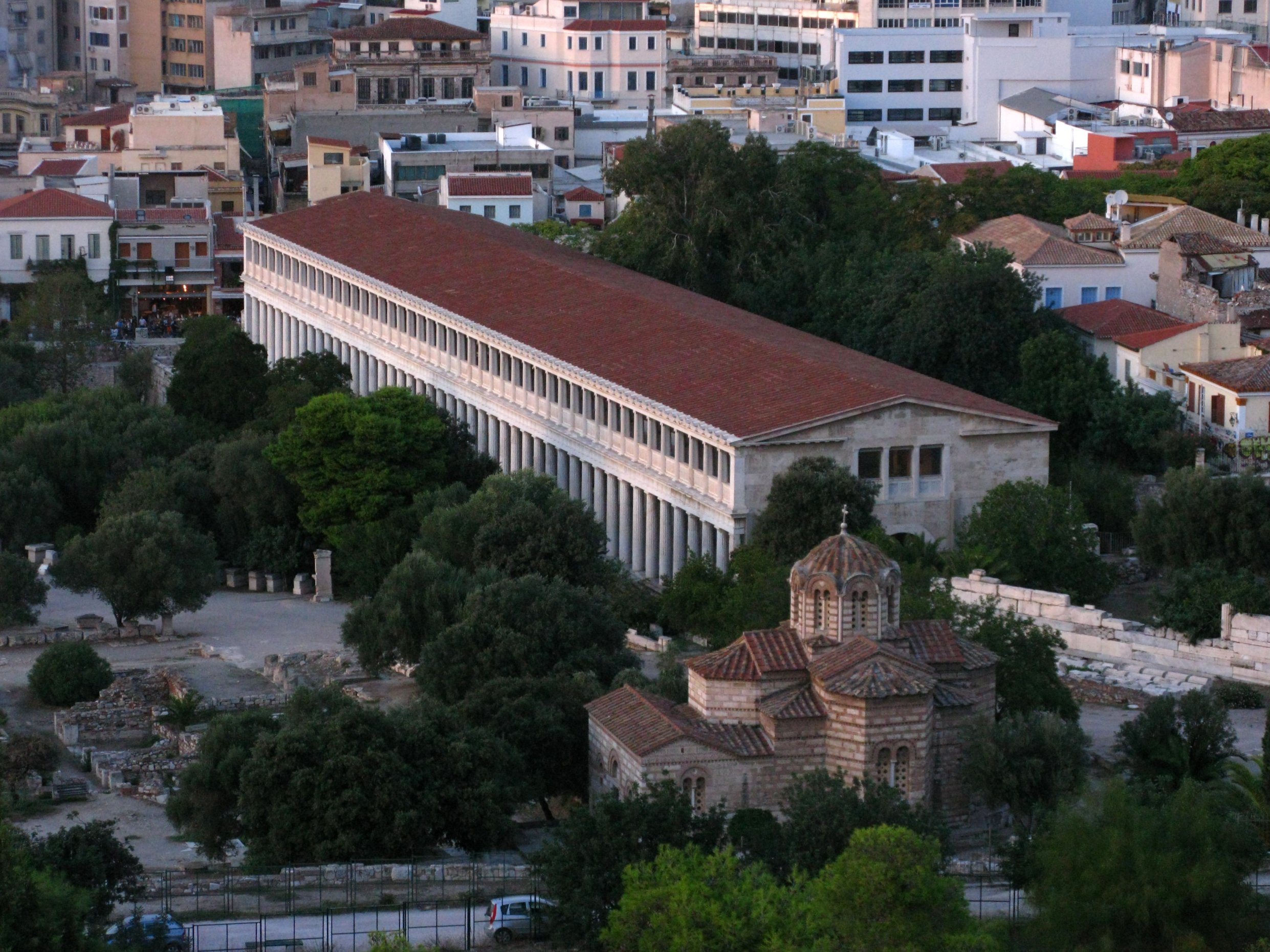 As seen from the Court of Cassation (Areopagus, i.e. the "Stone, or Hill, of Ares"). --- Στοά του Αττάλου. Αρχαία Αθηναϊκή Αγορά. . Θέα από τον (αρχαίο) Άρειο Πάγο.